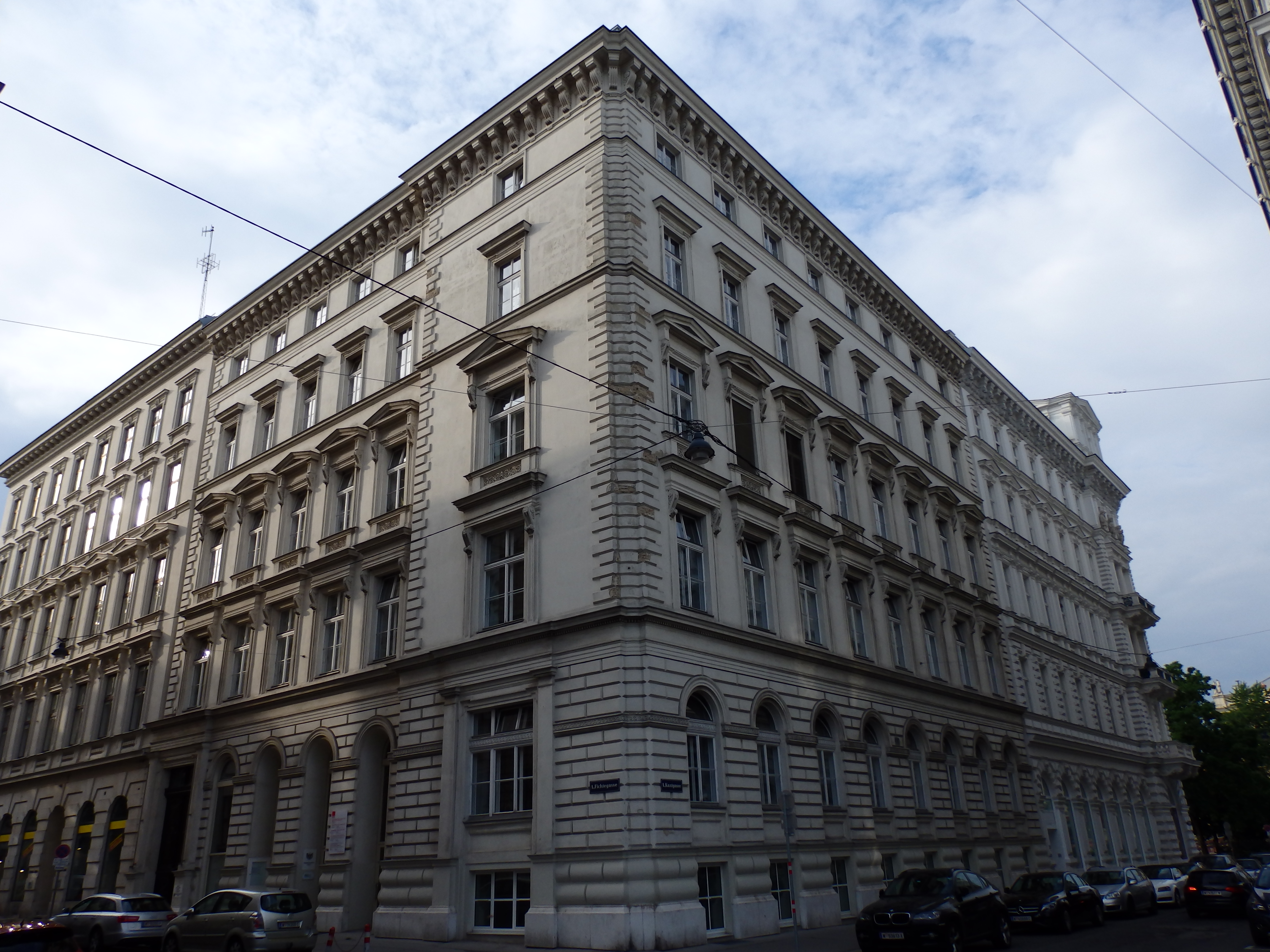 Wohnhaus (1868-69) von Carl Tietz, Fichtegasse 11, Wien-Innere Stadt